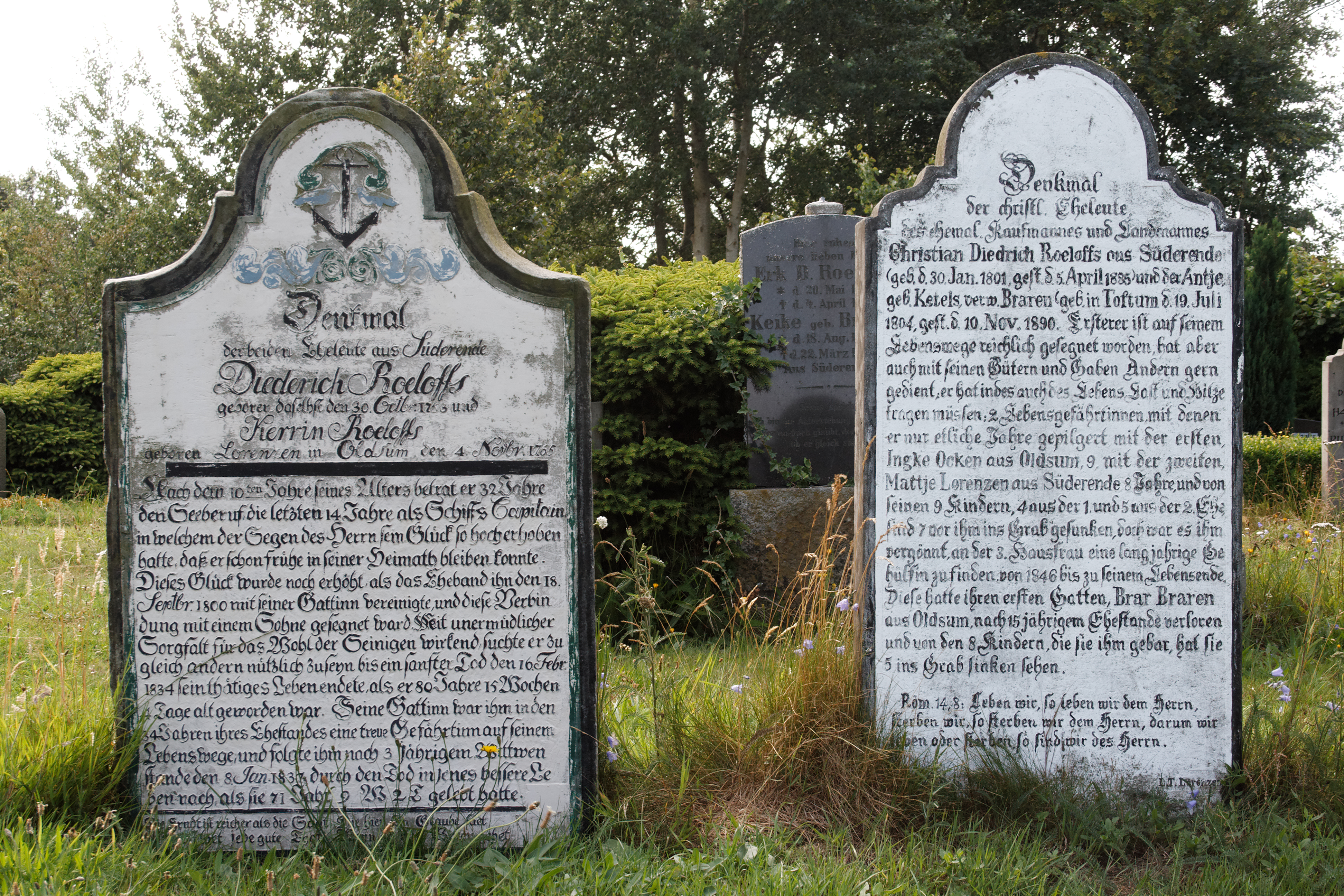 Grabsteine Diederich und Kerrin Roeloffs (gest. 1834, 1837); Christian Diedrich und Antje Roeloffs (gest. 1885, 1890) auf dem Friedhof der Kirche St. Laurentii in Süderende, Insel Föhr.